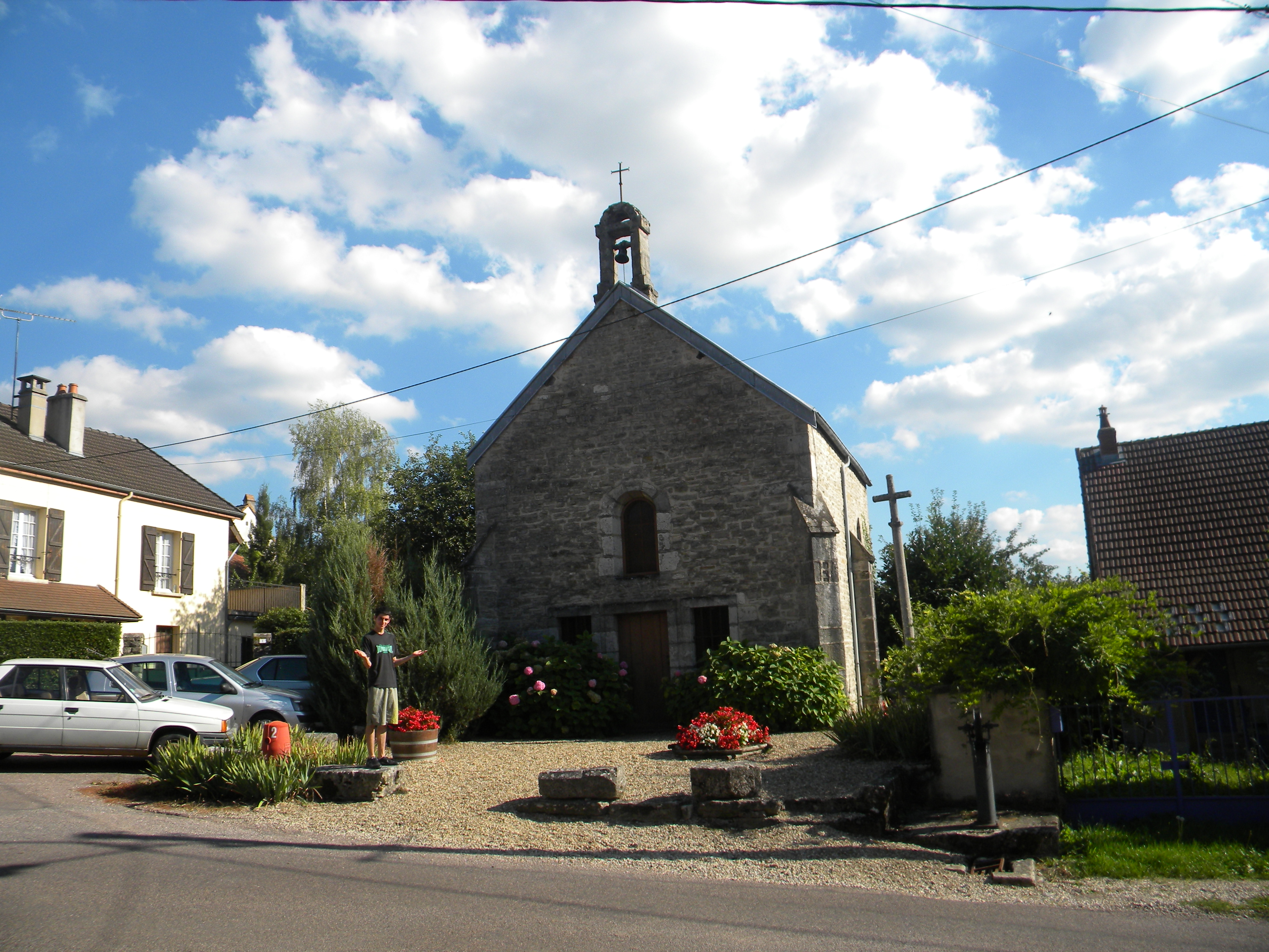 Cormot-le-grand, chapelle